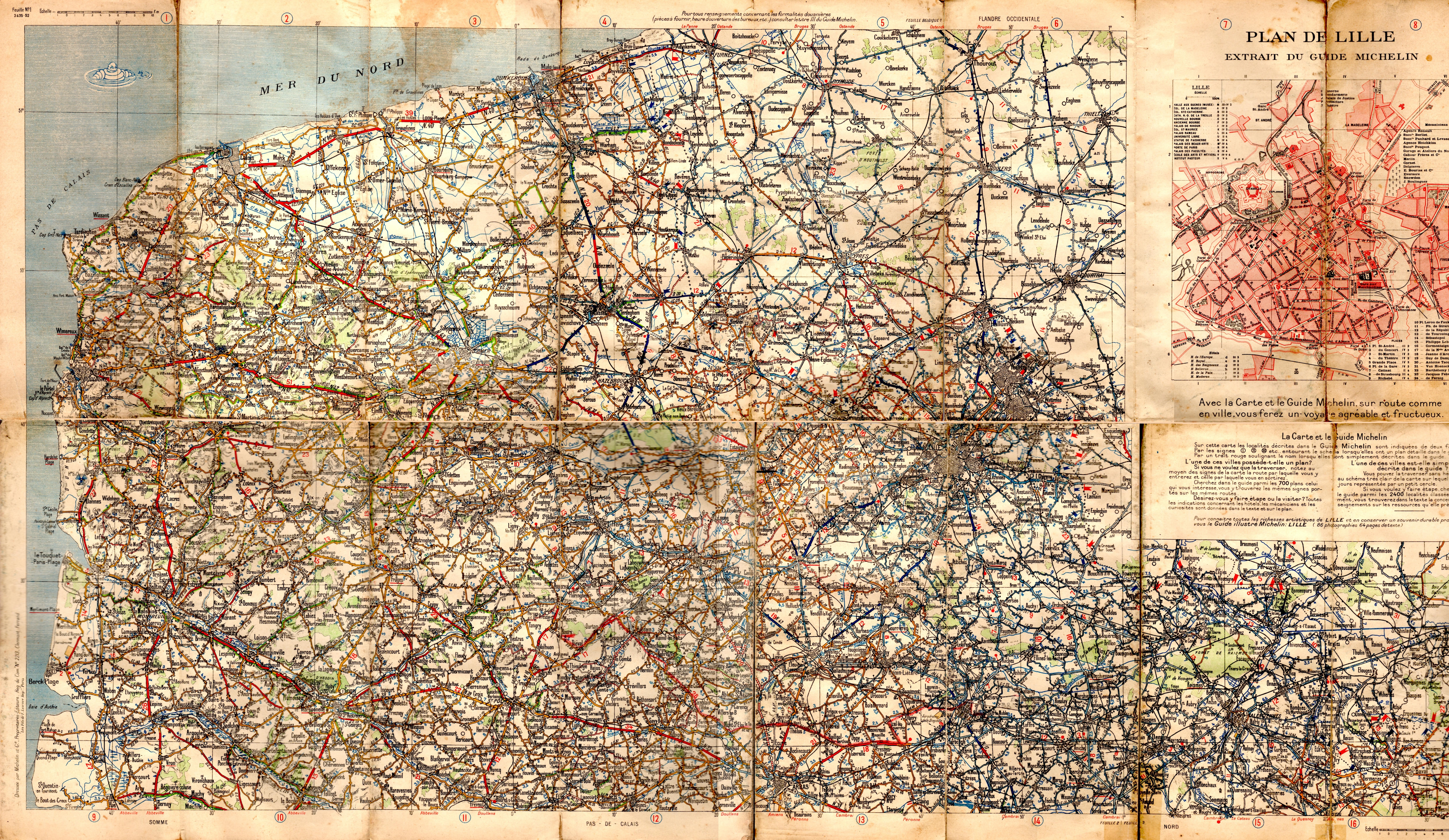 Carte d'État-Major Michelin datant du début des années 1920 montrant le tracé des voies ferrées, certaines ont disparu depuis.